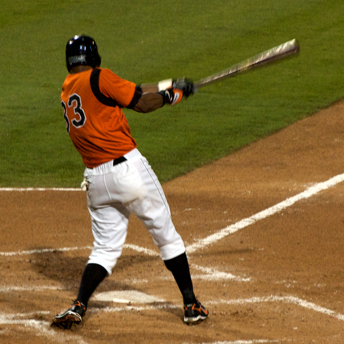 Eric Crozier